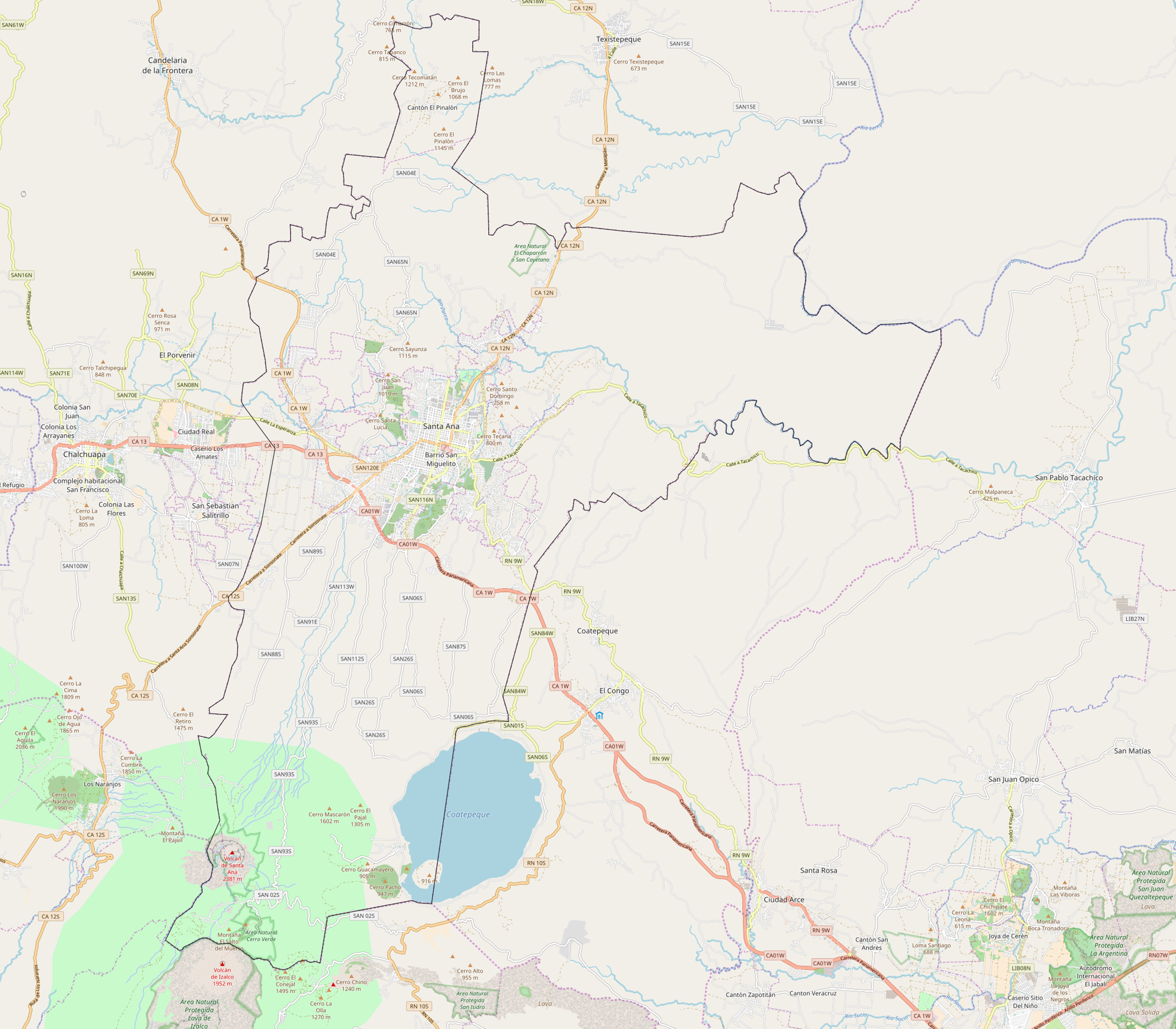 Municipio de Santa Ana visto por OpenstreetmapThis map of Santa Ana, El Salvador was created from OpenStreetMap project data, collected by the community. This map may be incomplete, and may contain errors. Don't rely solely on it for navigation.